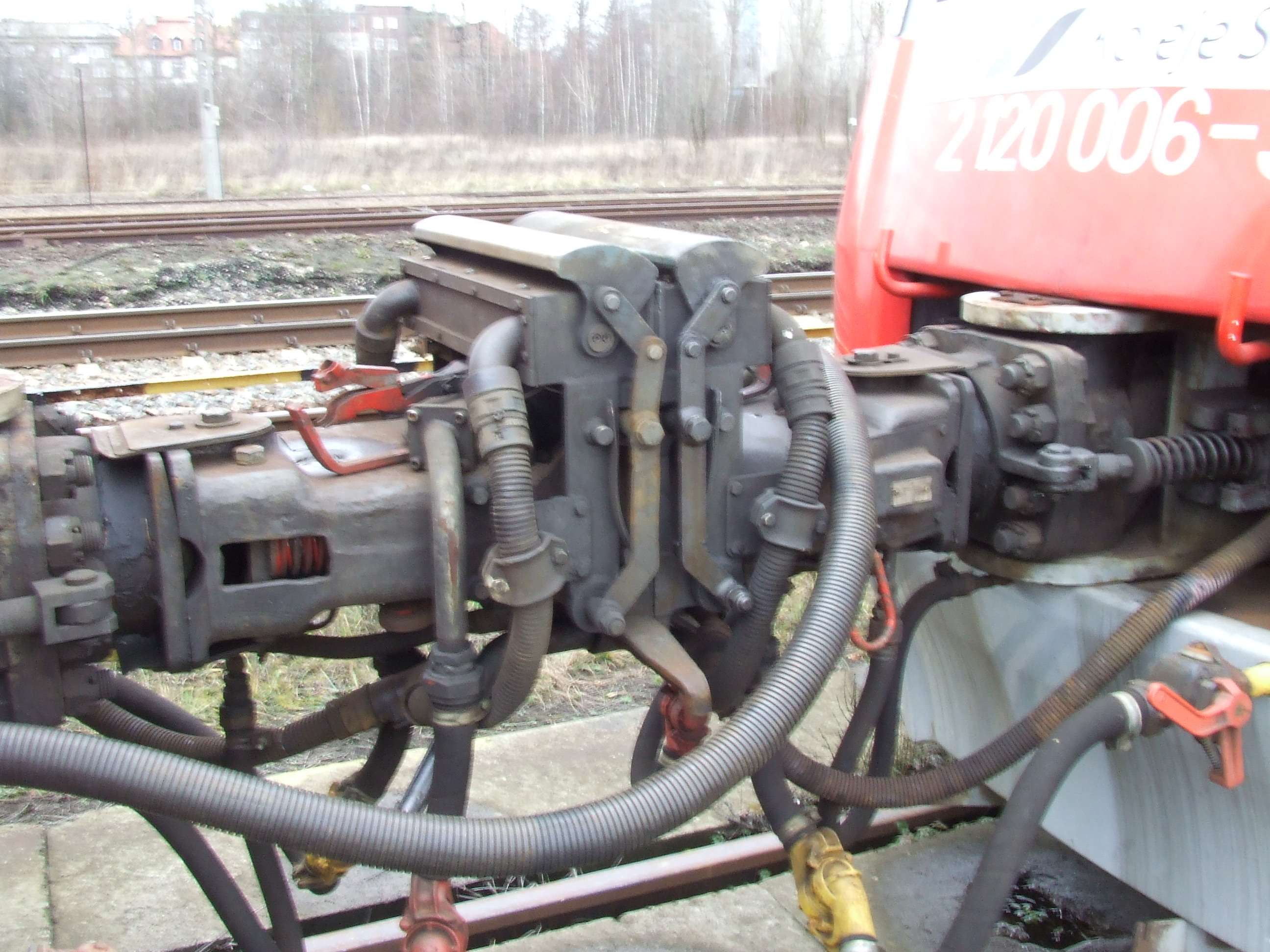 Sprzęg automatyczny elektrycznego zespołu trakcyjnego 14WE w stanie połączonym.